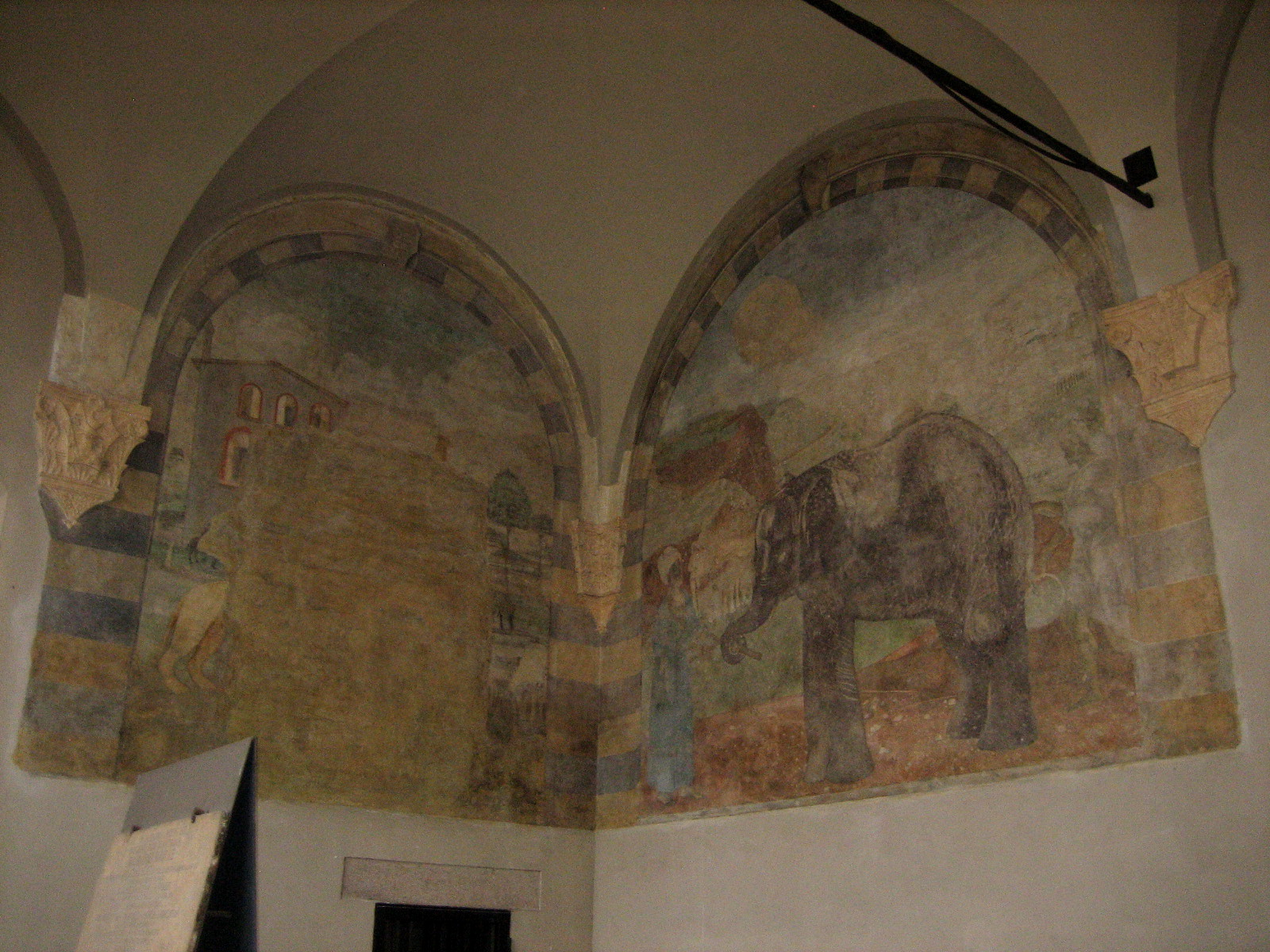 Affresco dell'elefante, Portico dell'elefante, Castello Sforzesco di Milano